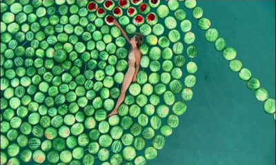 Video art